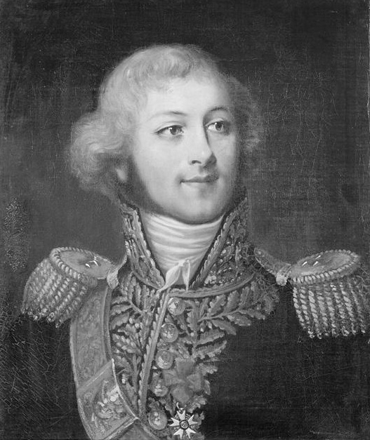 Lubin Martin Vandermaesen (1766-1813), général de division et comte de l'Empire.